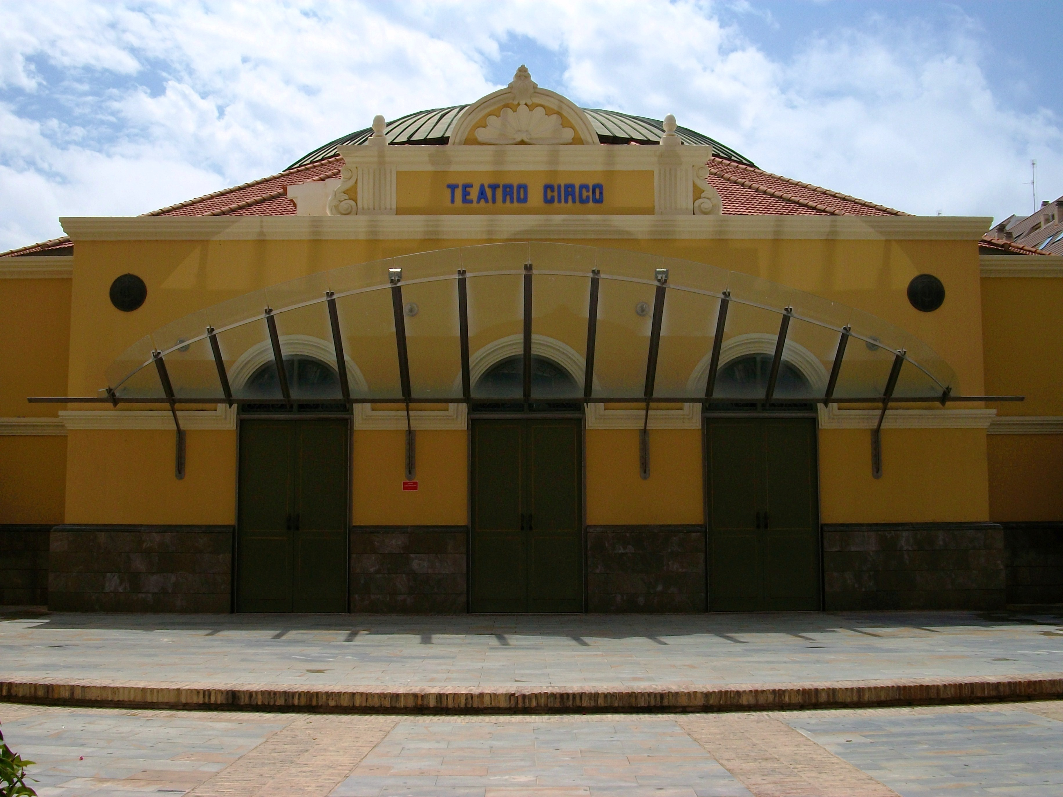 Teatre Circ d'Oriola.